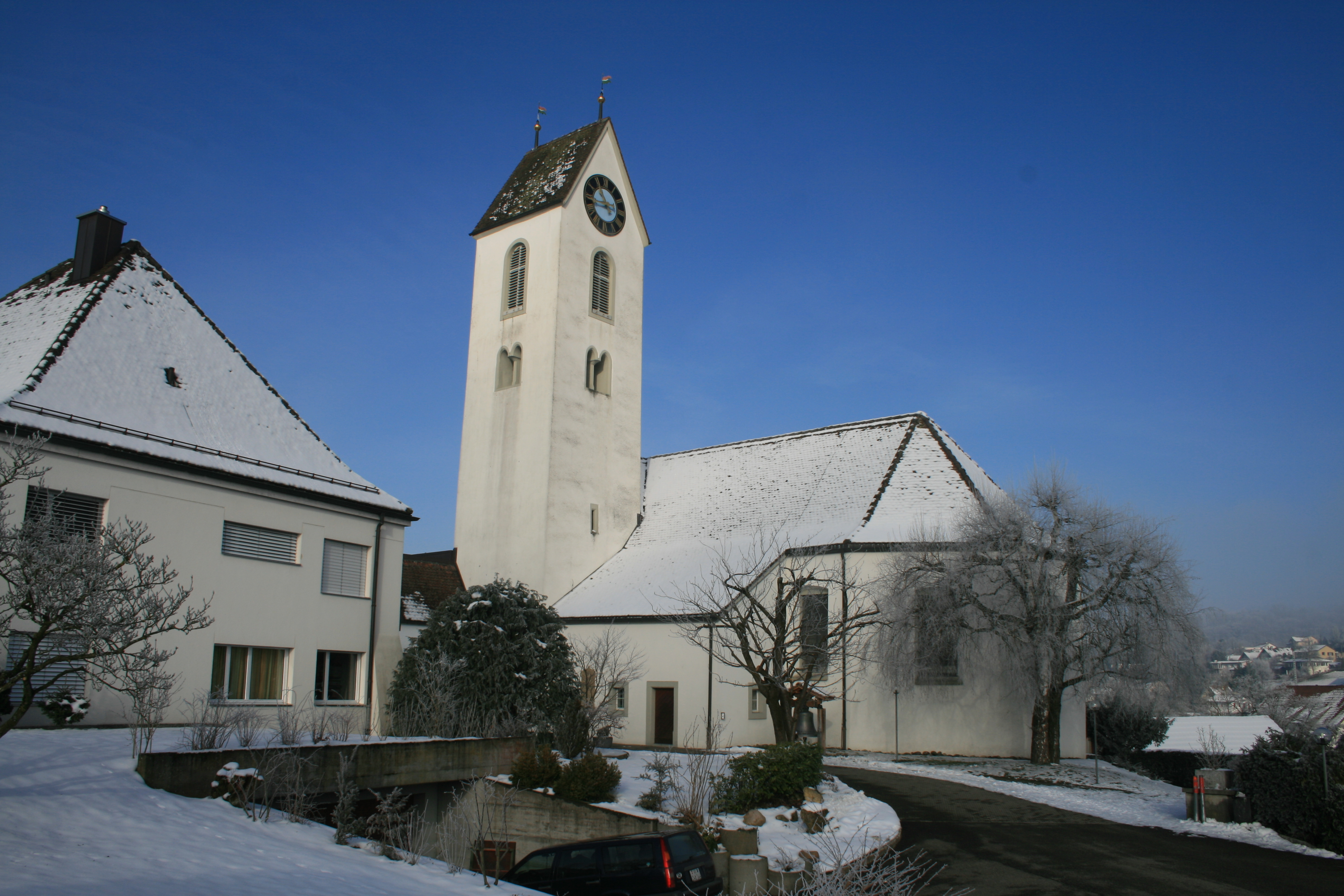 Lengnau AG